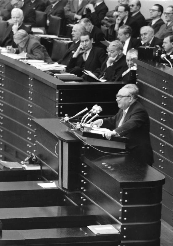 1. Lesung der Pariser Verträge im Deutschen Bundestag am 16. Dezember 1954 Es spricht Erich Ollenhauer